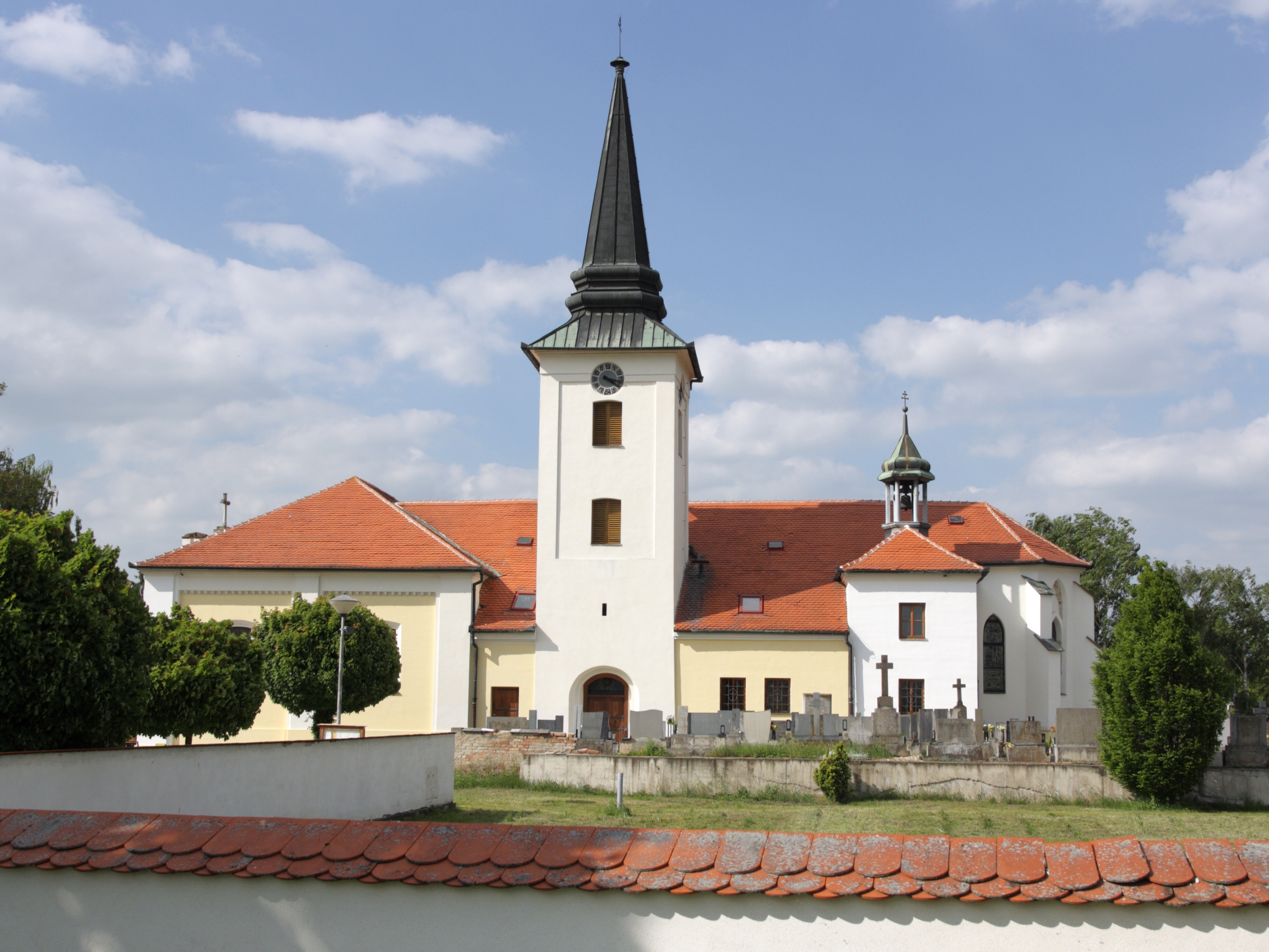 Moutnice - kostel svatého Jiljí